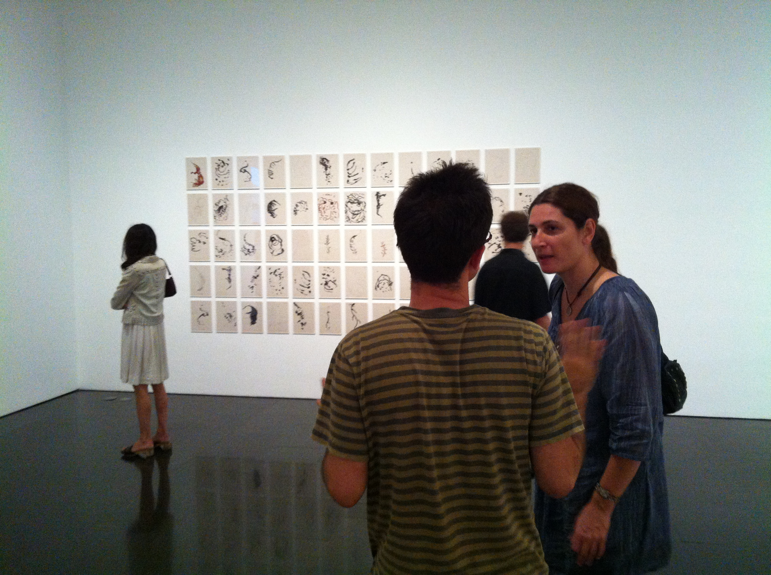 Lluis Claramunt exhibit at MACBA Barcelona